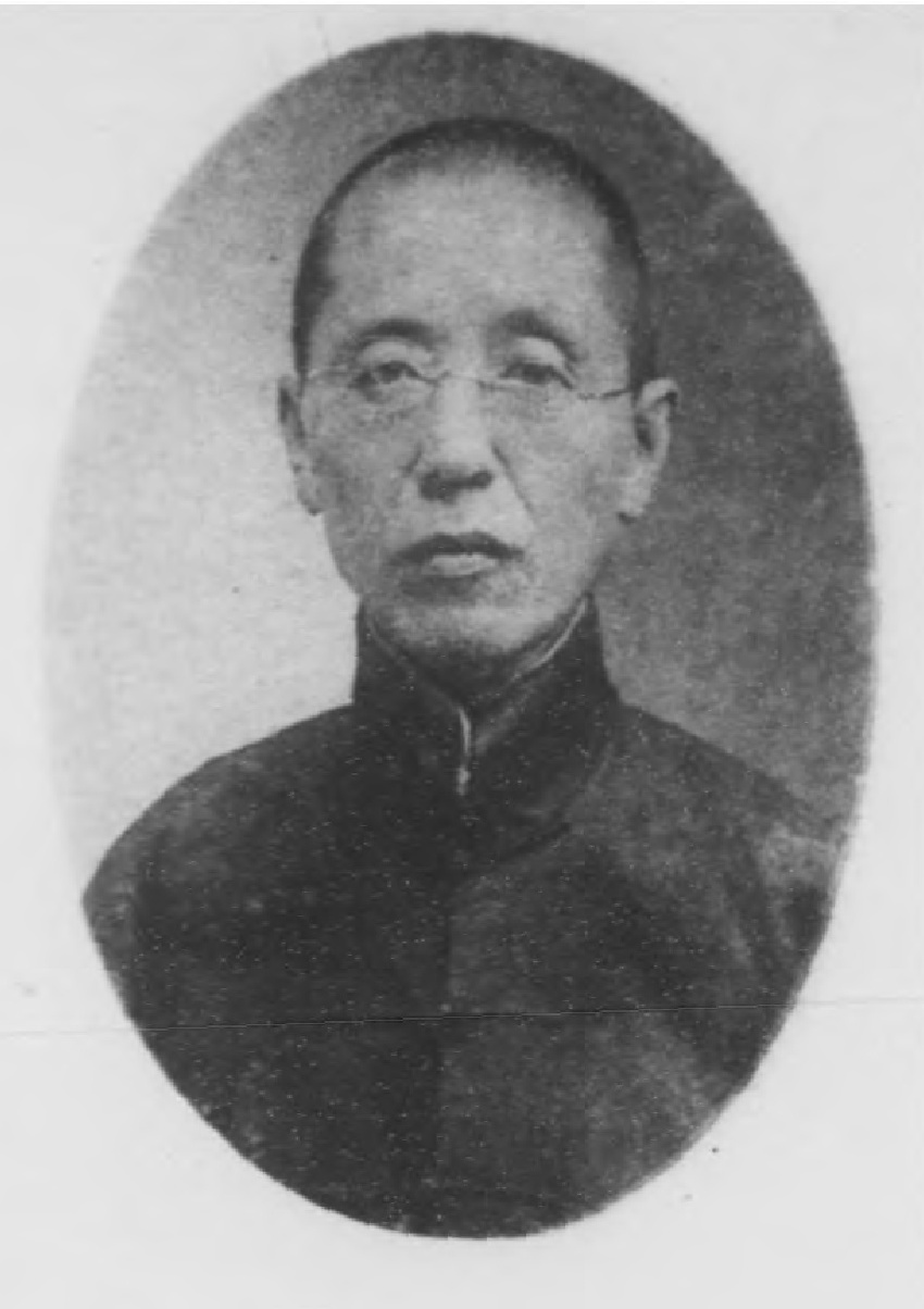 光緒甲辰科進士小像